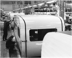 Wohnwagenbeschreibung Knospe